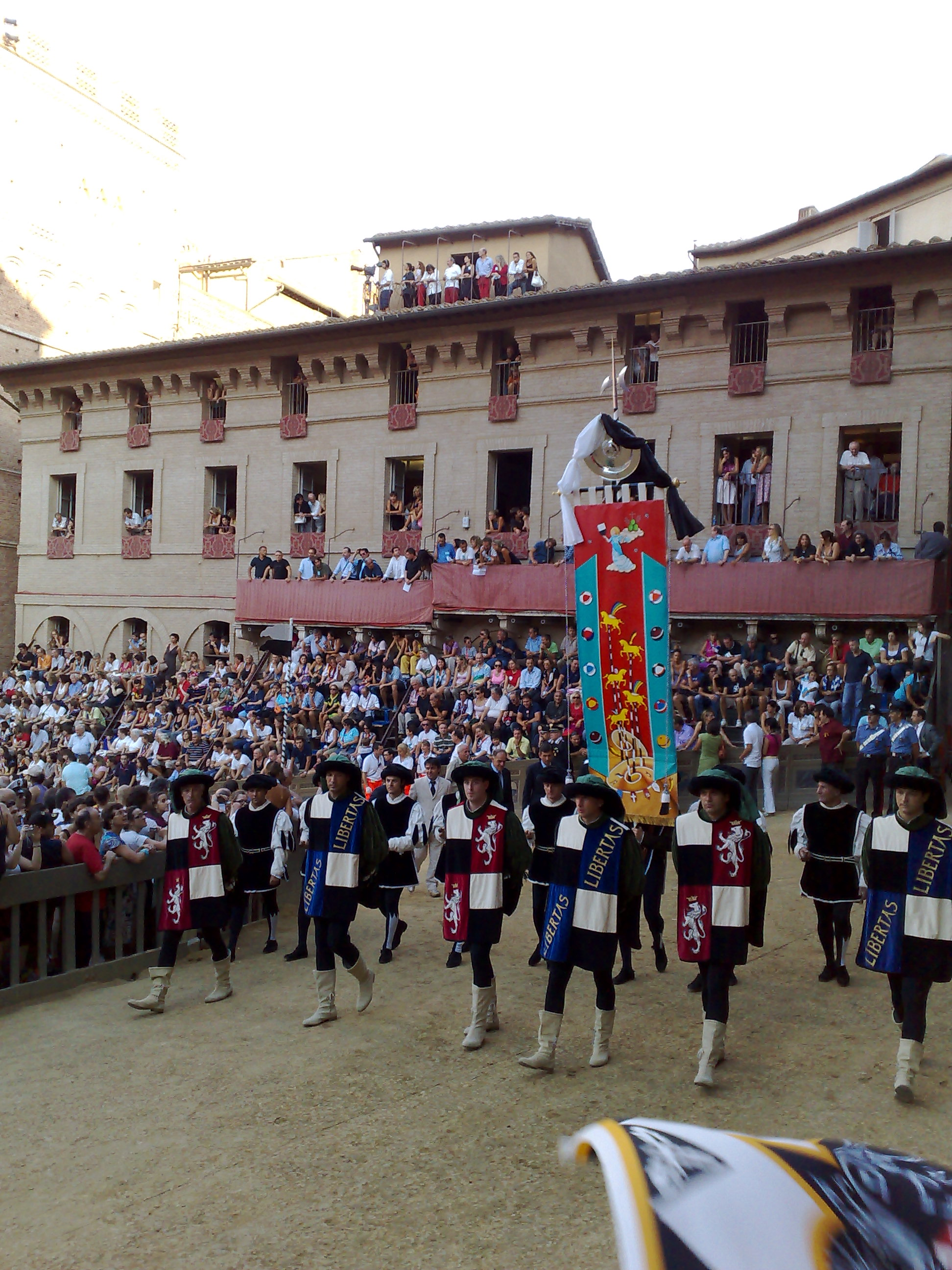 Procession